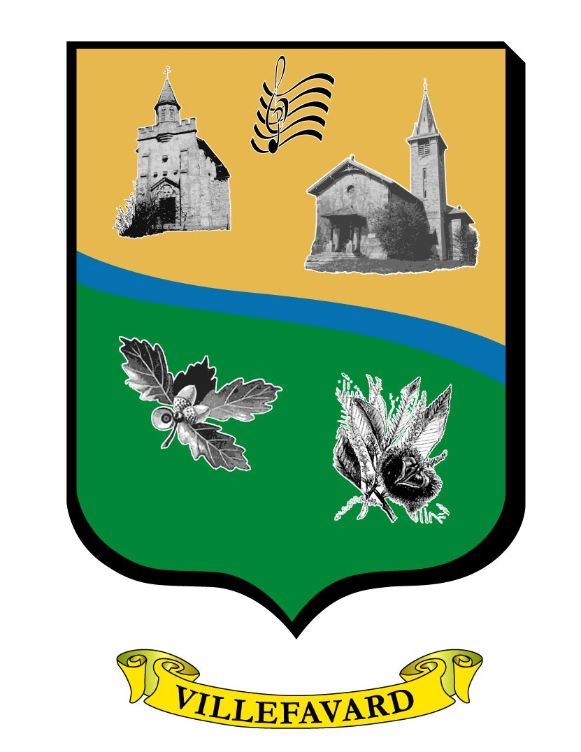 Blason definitif de la commune de Villefavard Haute-Vienne